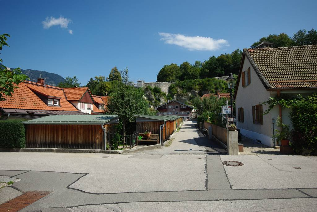 Glück im Winkel in 83435 Bad Reichenhall